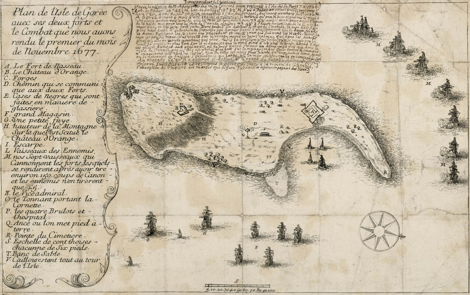 Plan du combat de novembre 1677 opposant une escadre française et une escadre hollandaise pour le contrôle de l'île de Gorée au large du Sénégal. Guerre de Hollande (1672-1678). Dimensions : 20,6 x 32,7 cm. Matière et technique : Estampe.